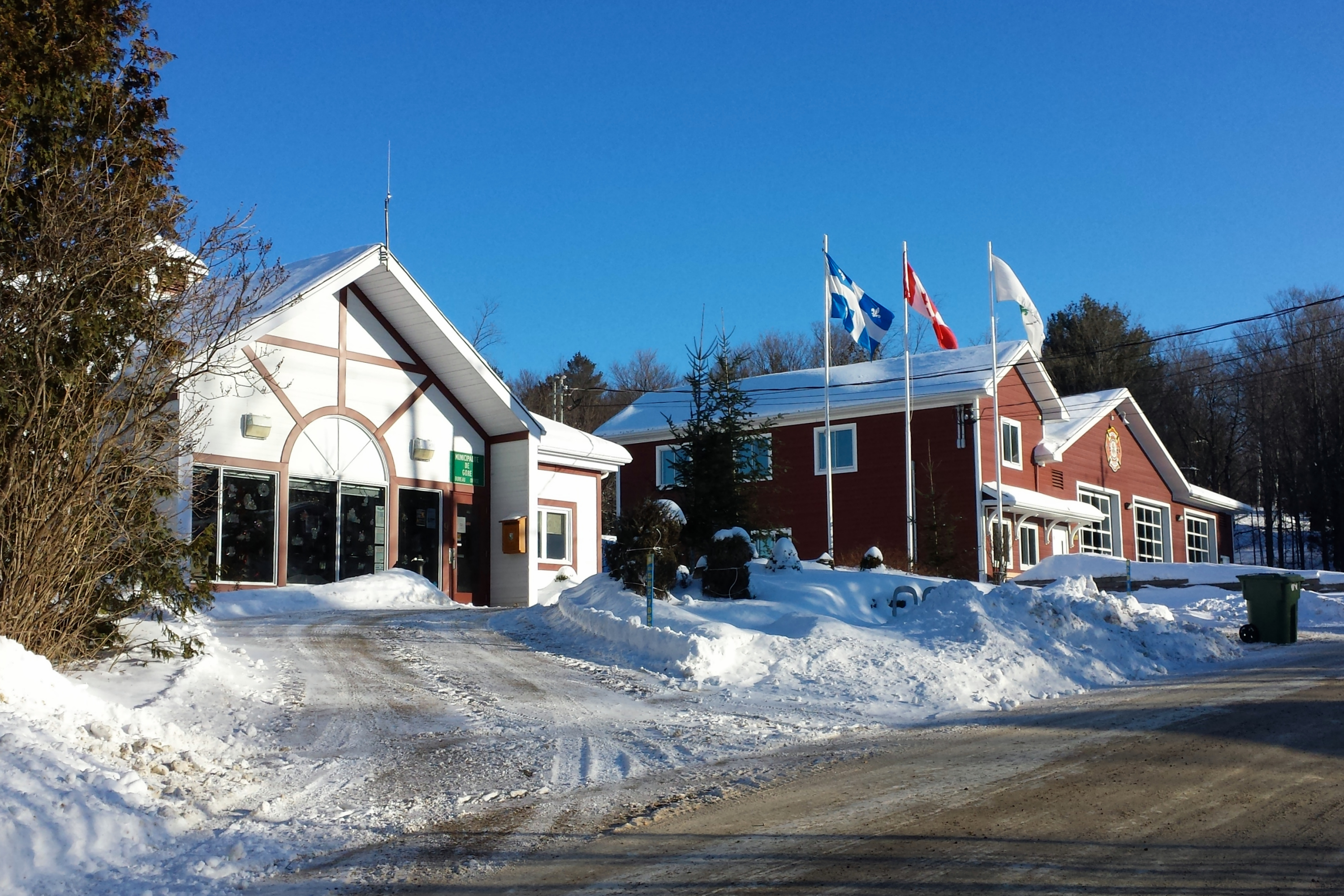 Gore, Quebec, Canada